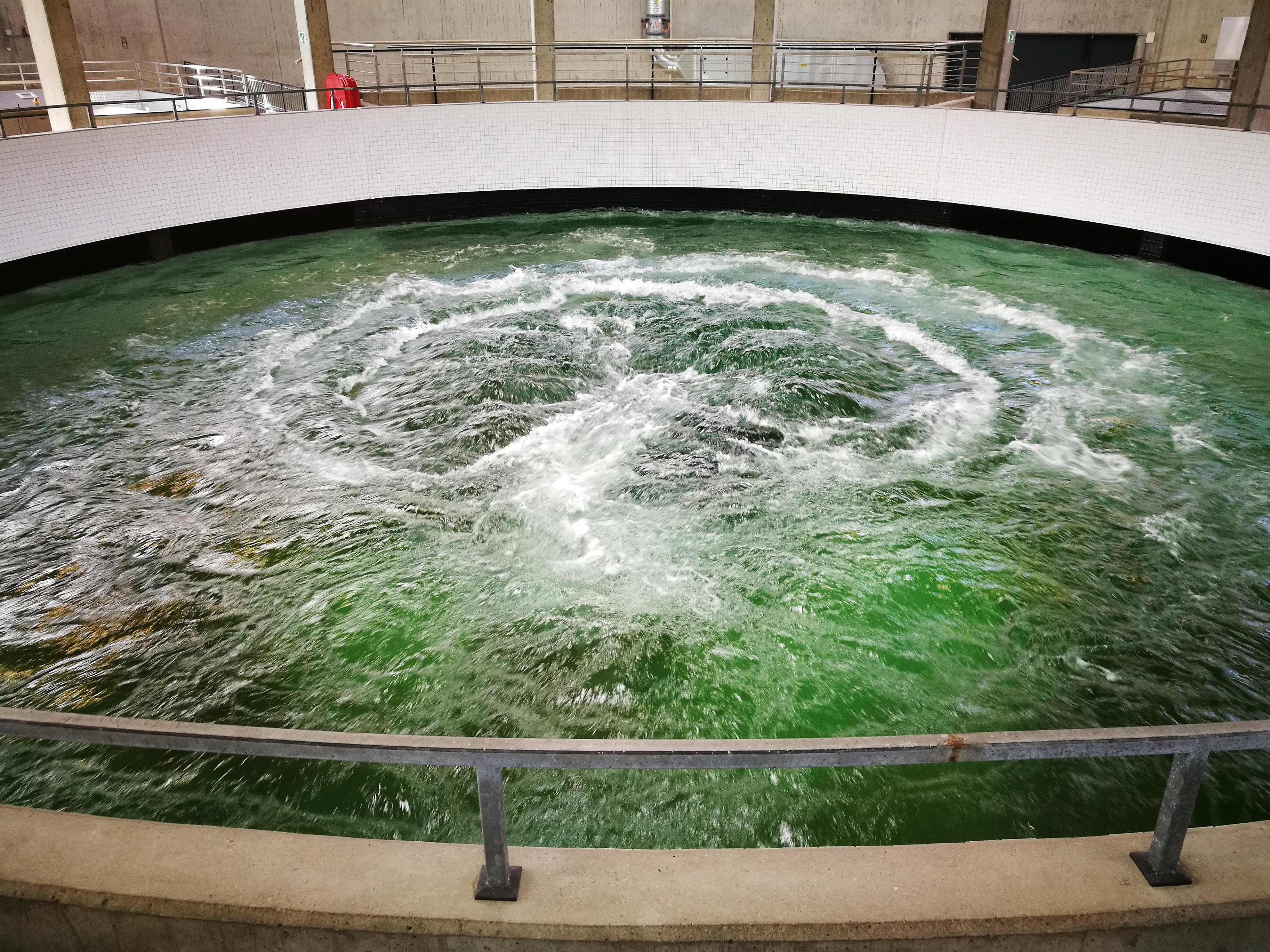 Deutschland (D) - Baden-Württemberg (BW) - Bodenseekreis (FN) - Überlingen: Bodensee-Wasserversorgung (BWV) - Quelltopf